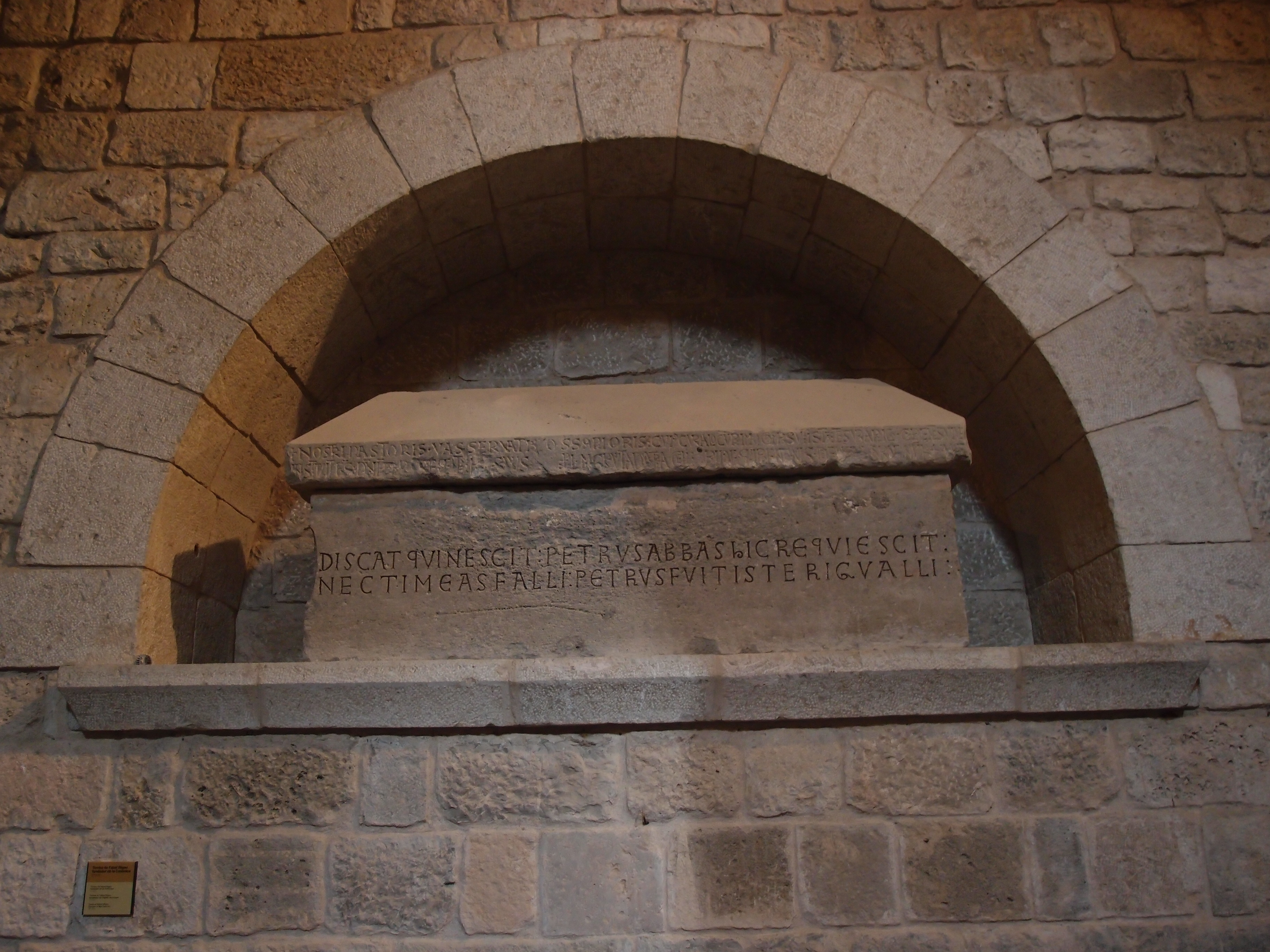 Kloster Santa Maria de Vilabertran (Alt Emporda / Katalonien) Datum: 15.09.2013 Urheber: M. Pfeiffer alias Benutzer:Gordito1869 Quelle: privates Fotoarchiv des Urhebers